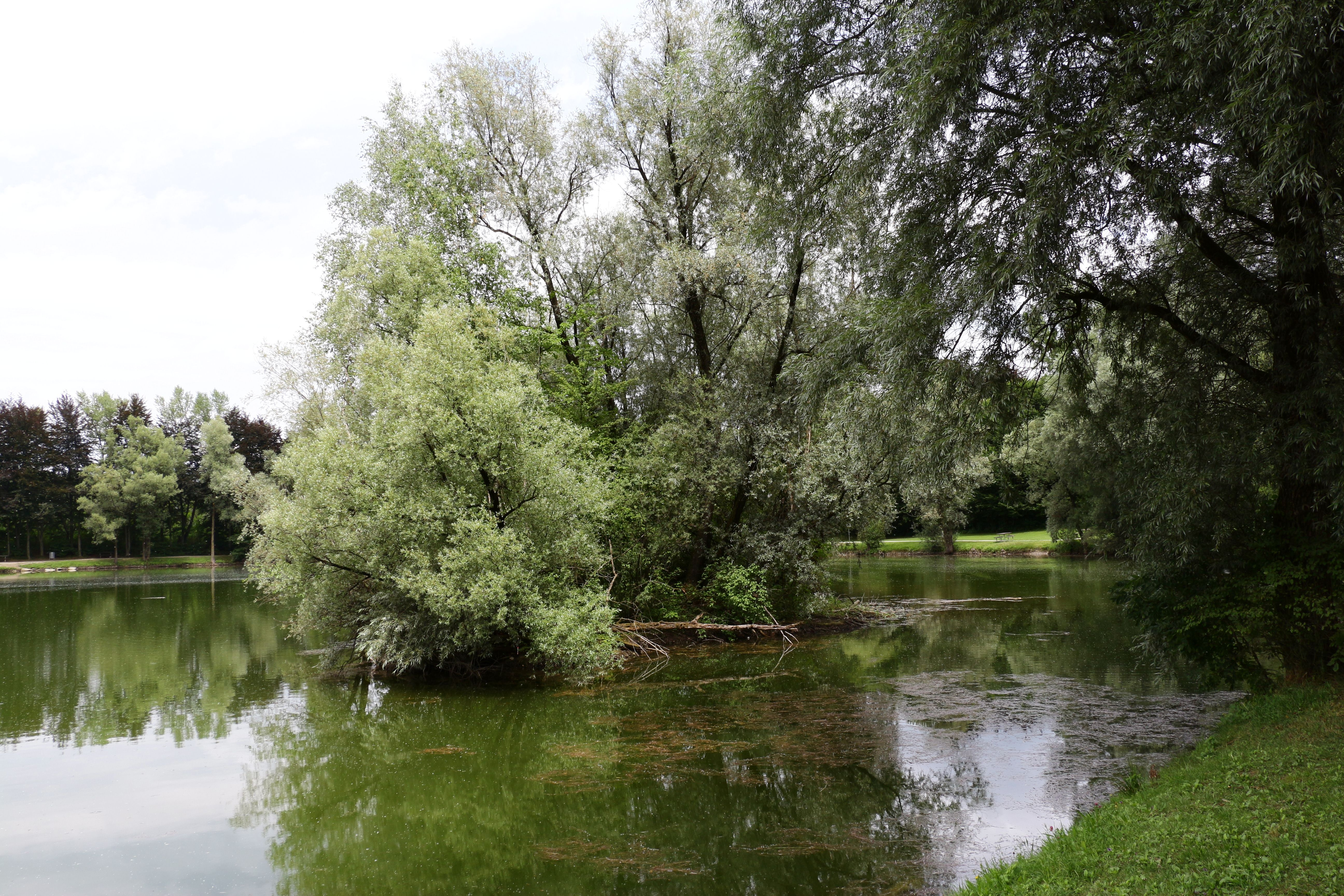 Der Karlsbader Weiher im Norden der Stadt Salzburg